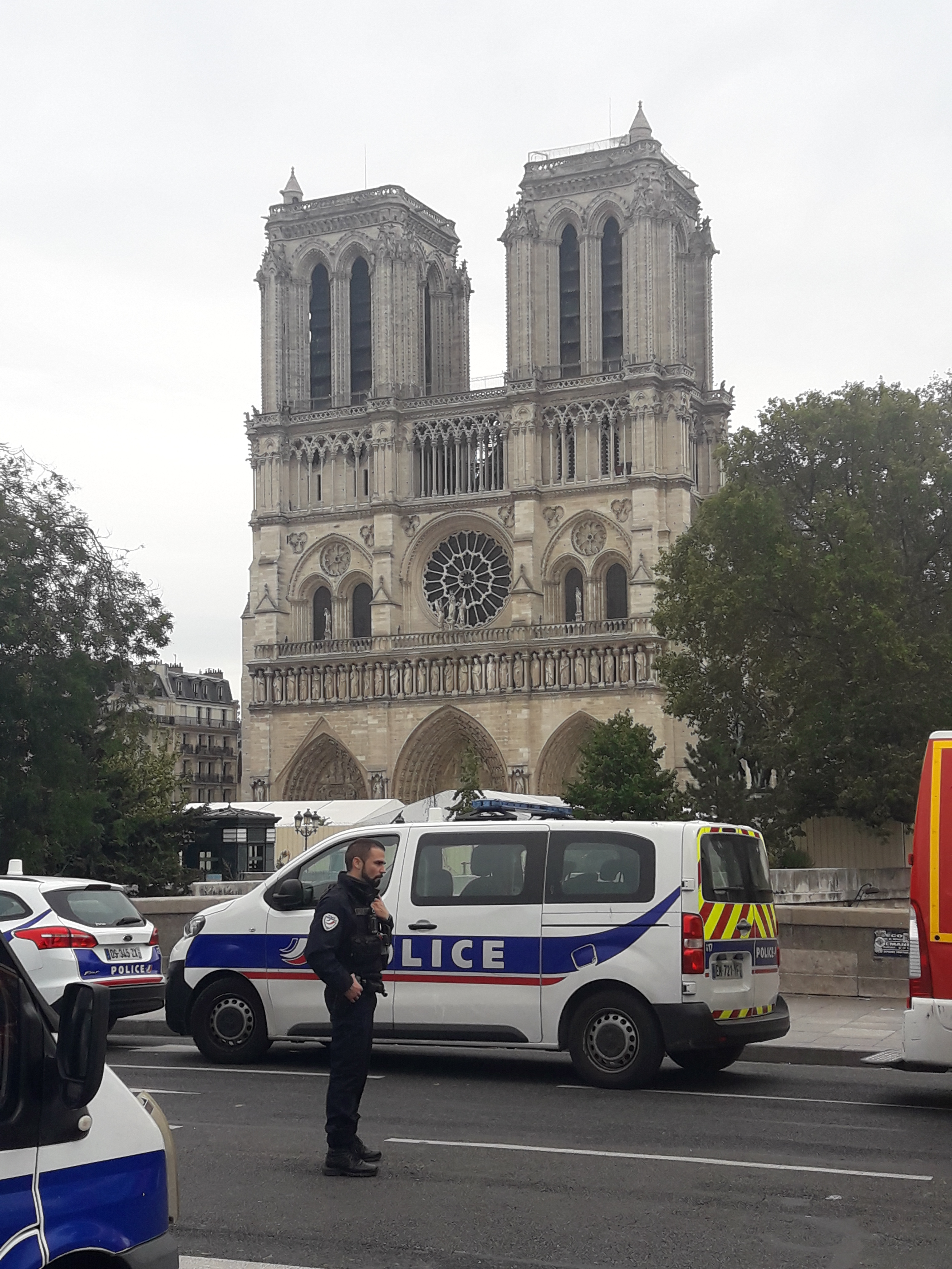 Paris notre dame attack.